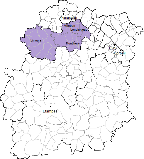 Carte des communes de la quatrième circonscription de l'Essonne (91)